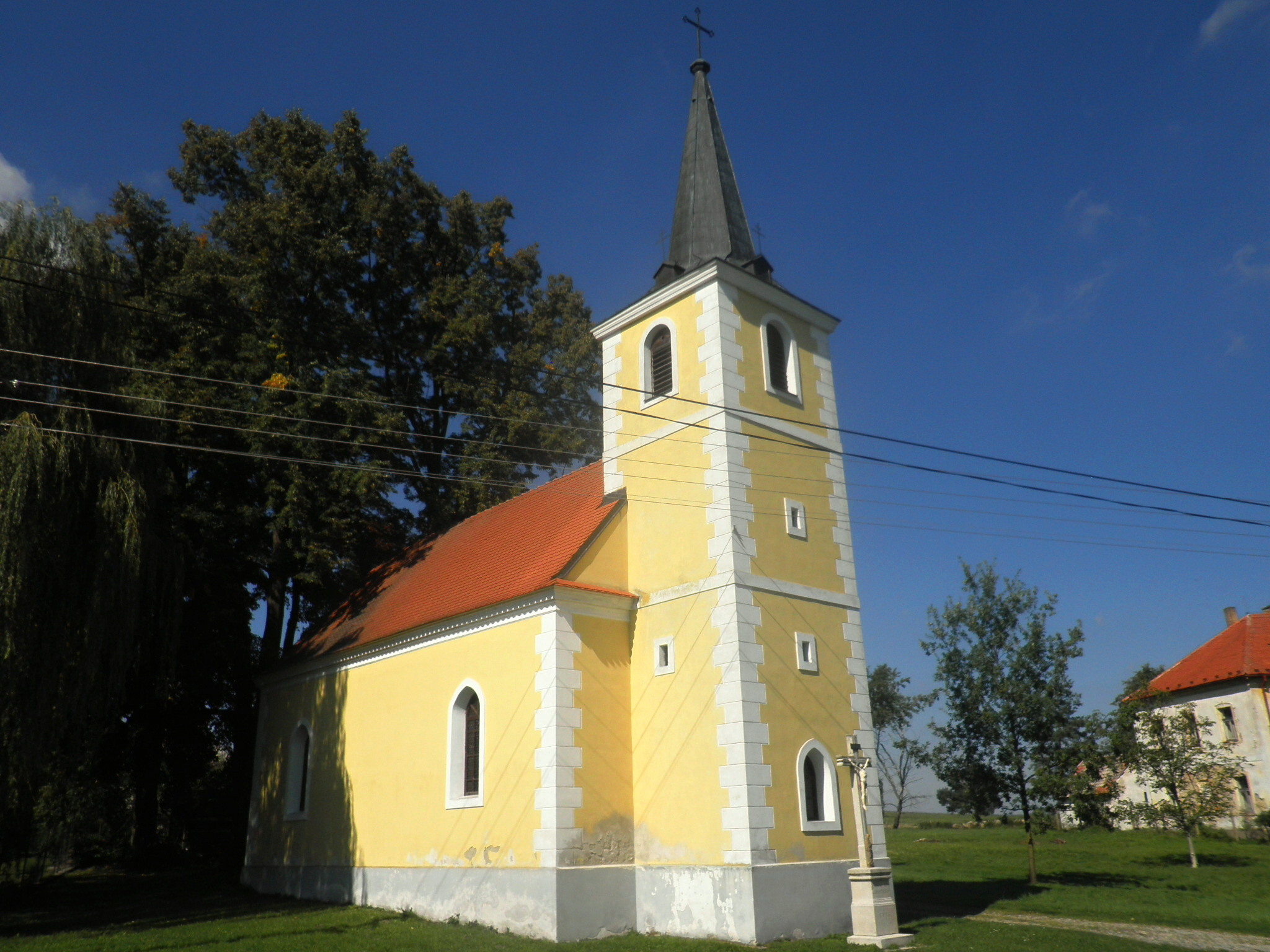 Kostel sv? (Kondrač), Kondrač